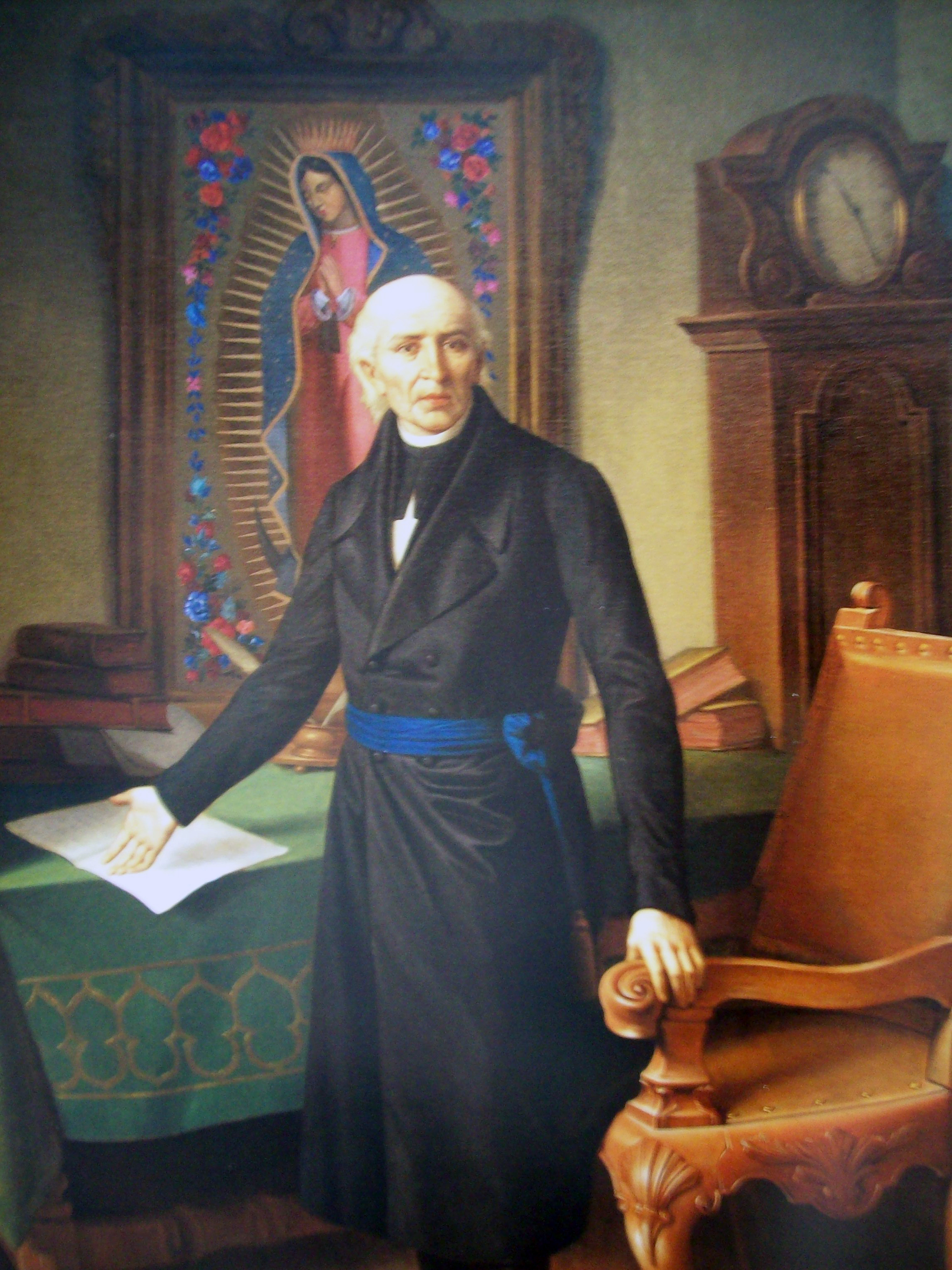 Miguel Hidalgo. Óleo sobre tela 1875. Tiburcio Sánchez. Salón de Cabildos del gobierno del Distrito Federal de México.